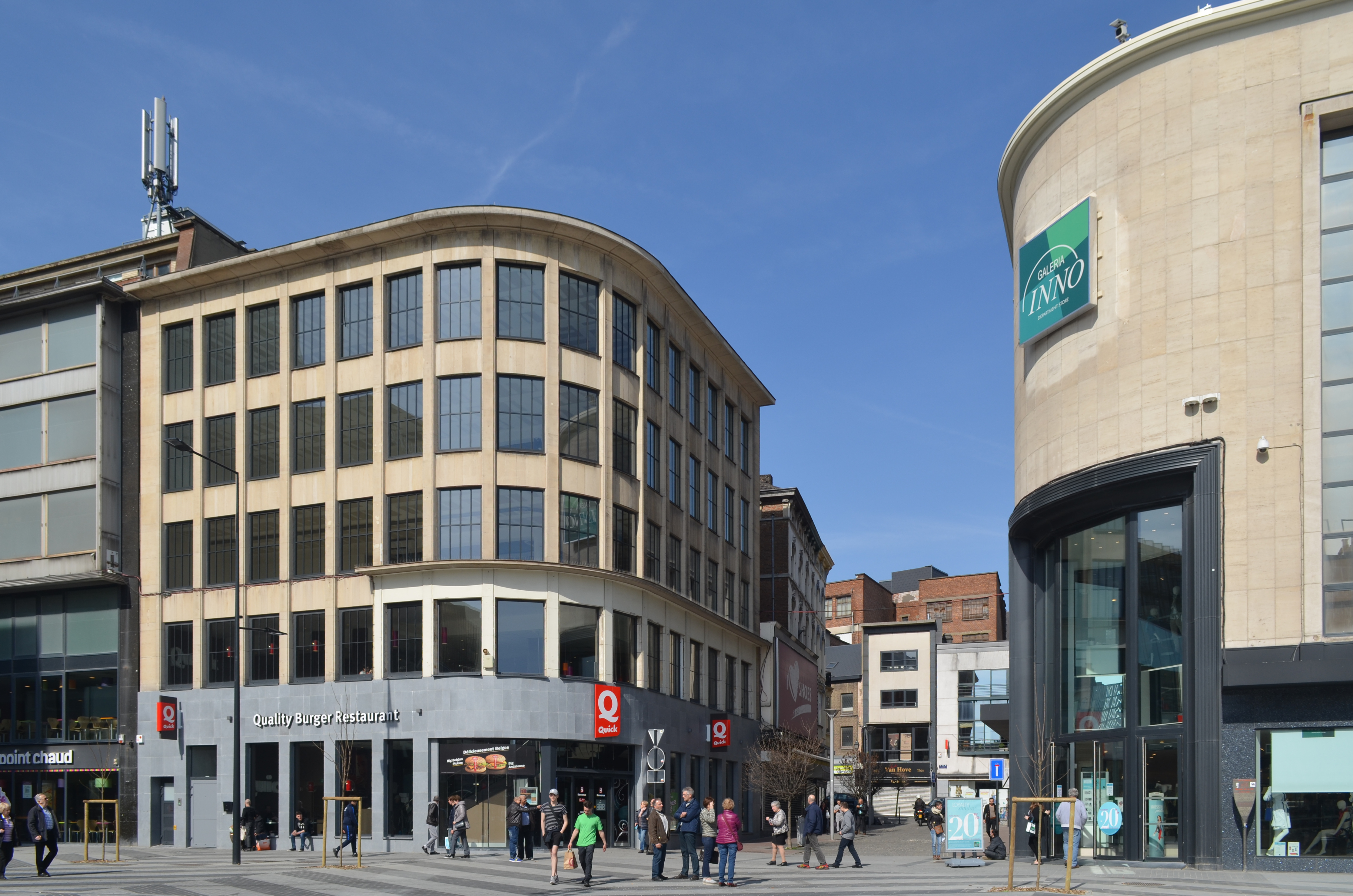 Charleroi - Boulevard Joseph Tirou - restaurant de hamburgers Quick et le grand magasin Galeria Inno.